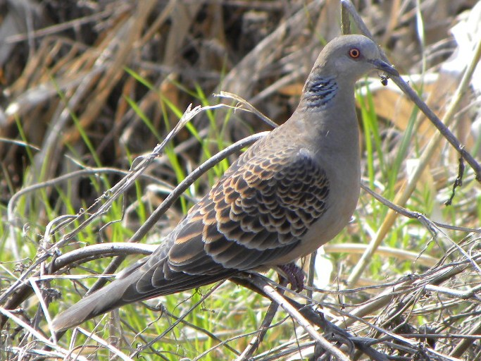 キジバト、2010年4月3日、神戸市西区で撮影